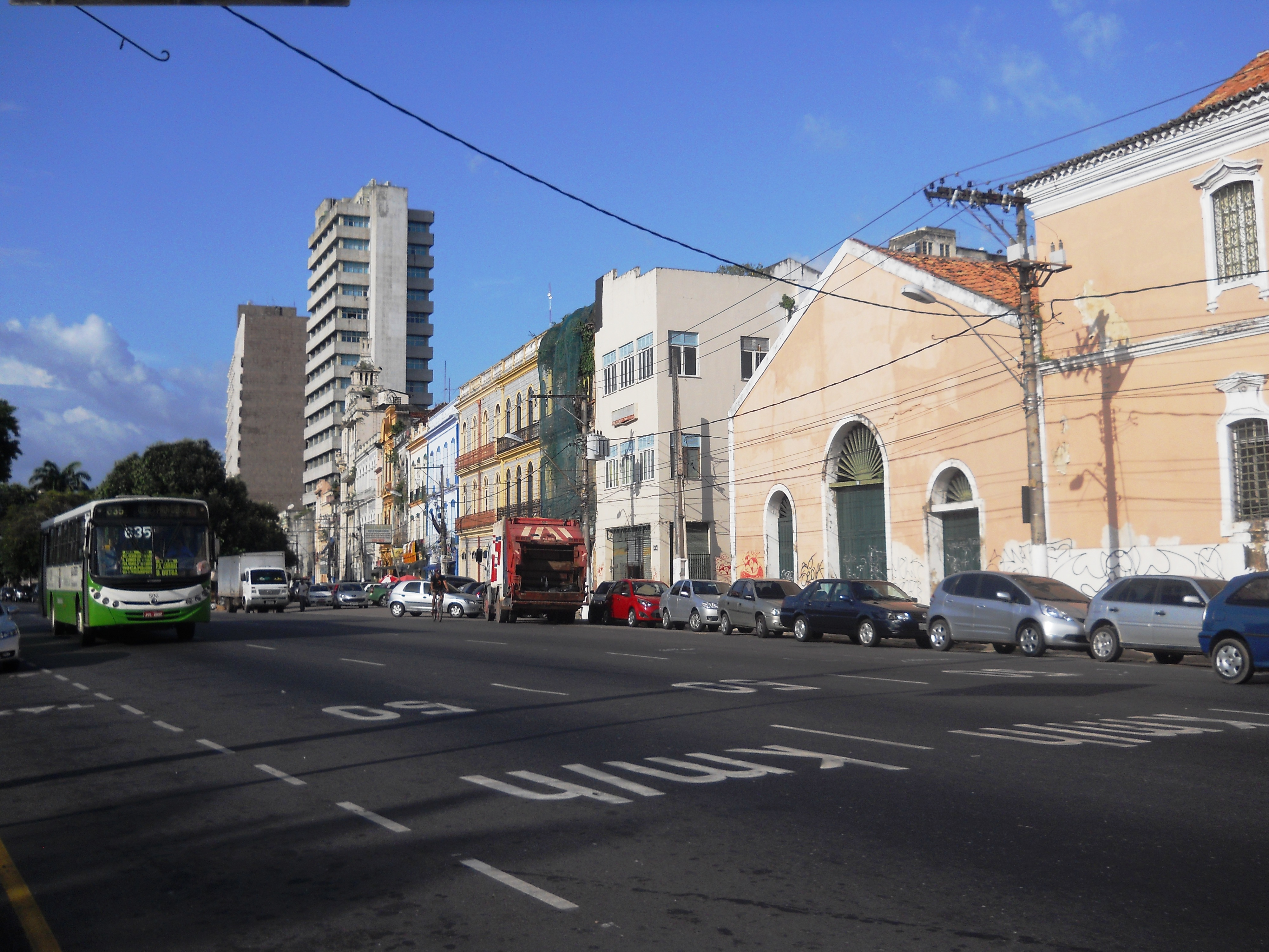 Conjunto arquitetônico e paisagístico "Ver-o-Peso" e áreas adjacentes, Praça Pedro II e Boulevard Castilhos França, inclusive o Mercado de Carne e o Mercado Bolonha de Peixe